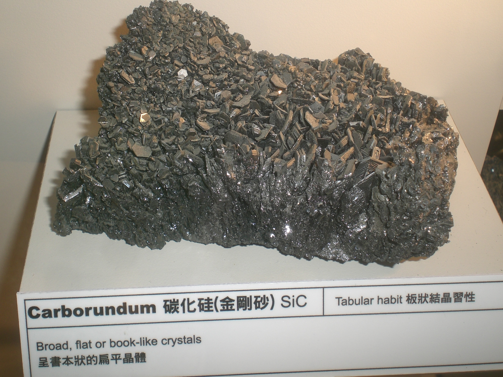 香港大學許士芬地質博物館 金剛砂